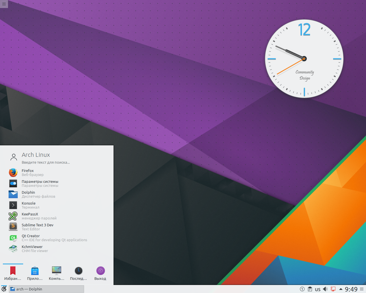 Arch Linux Distr with KDE Plasma 5.6 Desktop